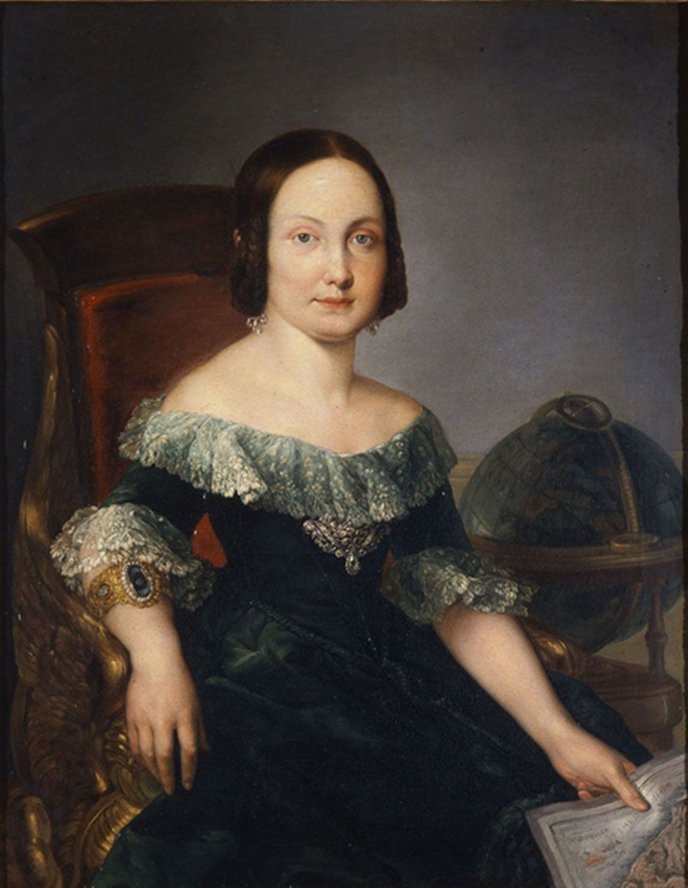 Pintura al óleo. Isabel II niña, estudiando geografía.